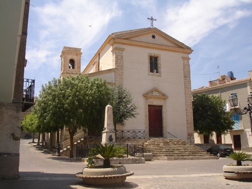 Castrofilippo: chiesa madre, Santa Maria del Rosario.